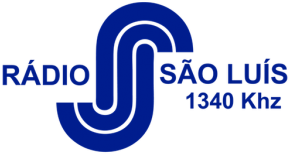 Logotipo da Rádio São Luís AM, emissora de rádio sediada em São Luís - MA, Brasil.